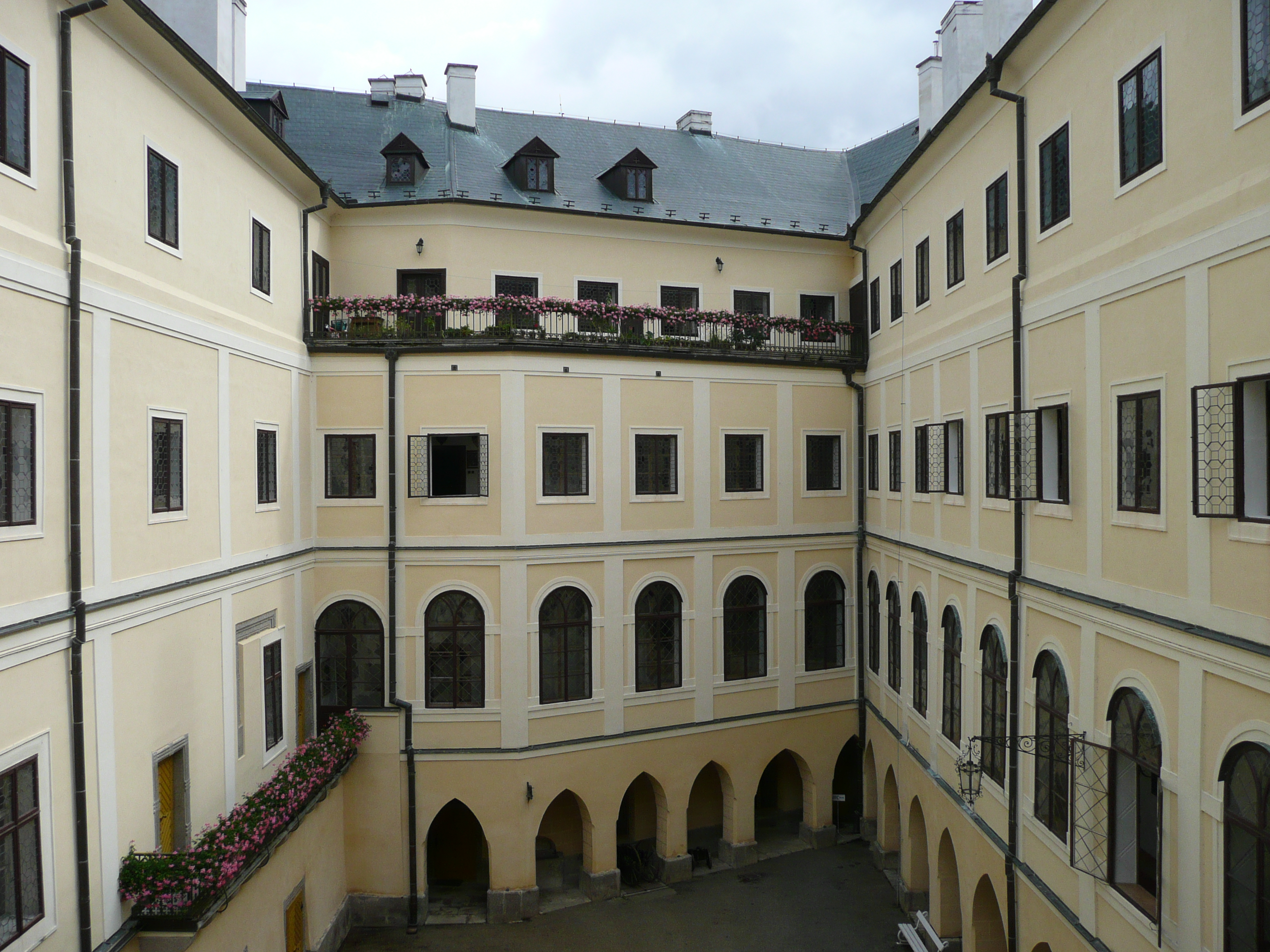 Zámek Orlík Orlík nad Vltavou, Orlík nad Vltavou 112